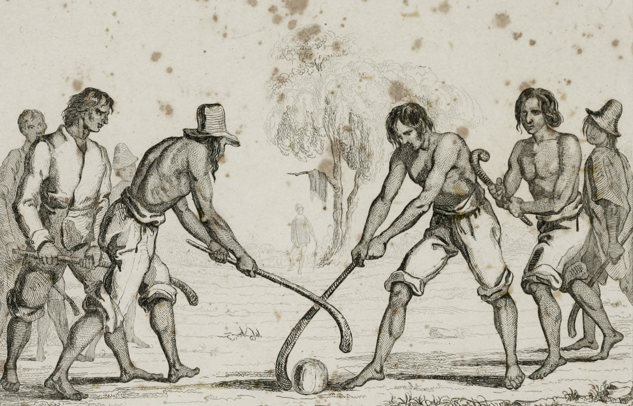 Costumbres populares: Juego de la cineca (chueca); se trata del juego mapuche palín.